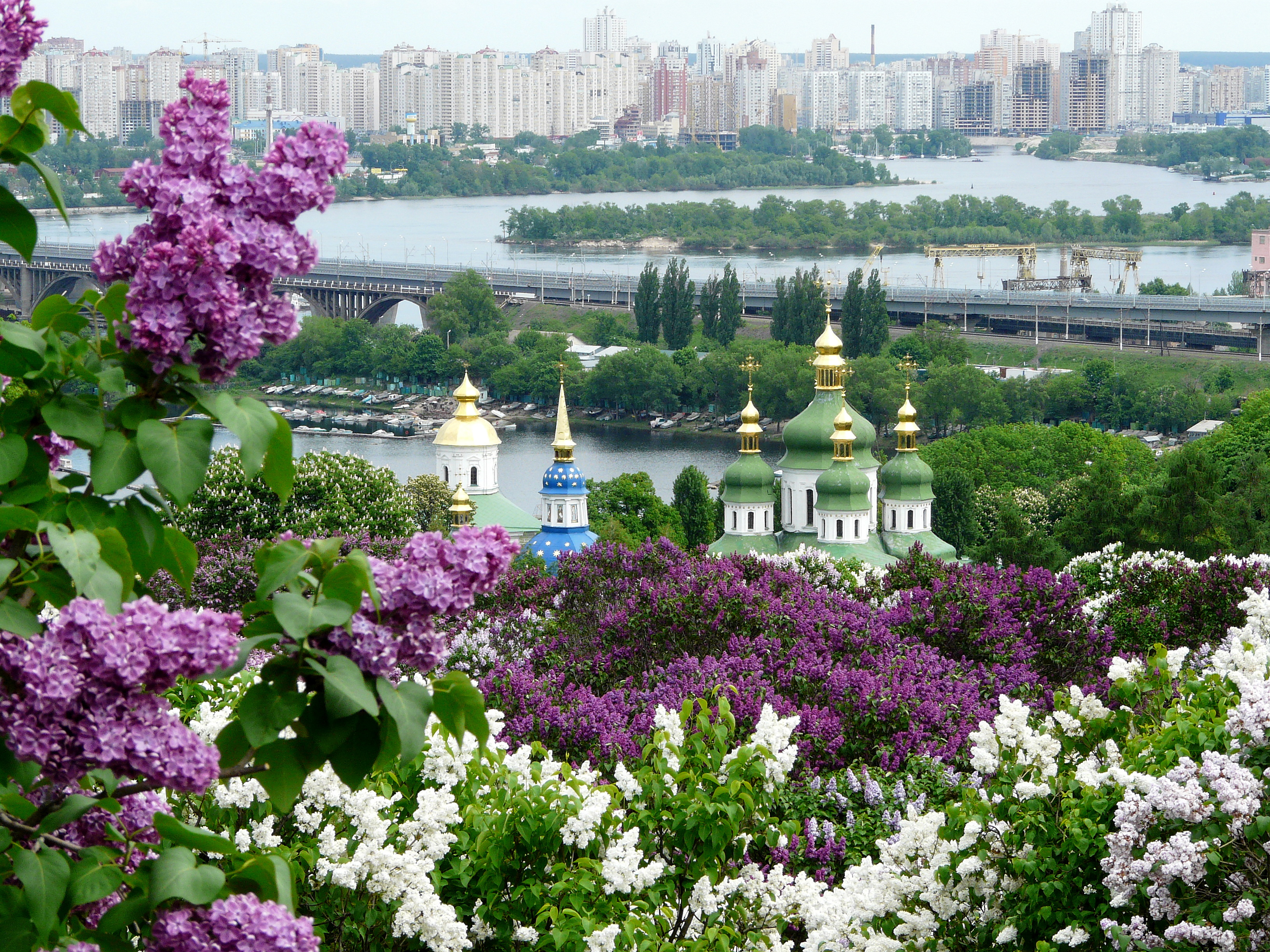 Комплекс Свято-Михайлівського Видубицького монастиря, Київ, Видубицька вул., 40